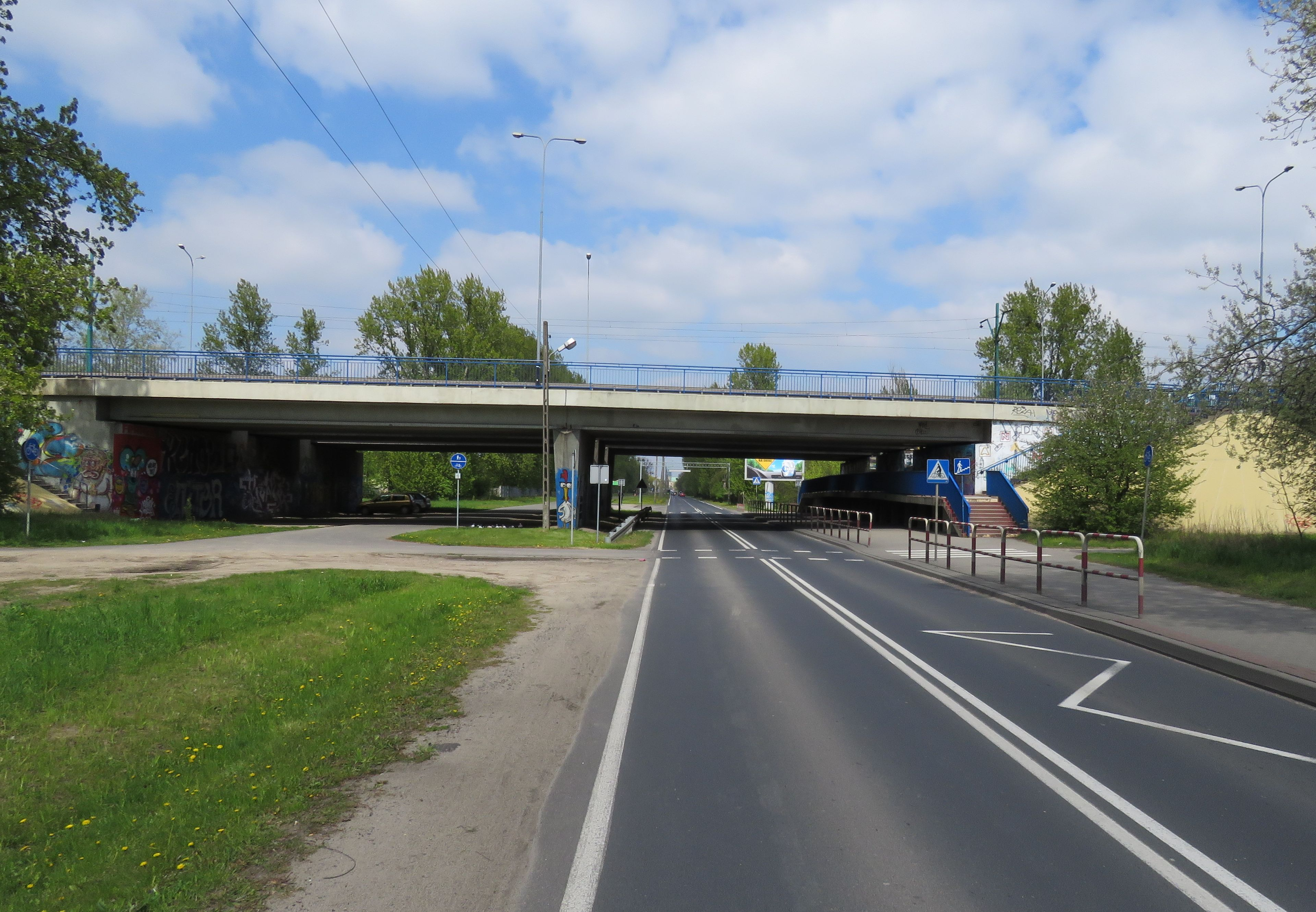 Wiadukt Hetmański w Poznaniu